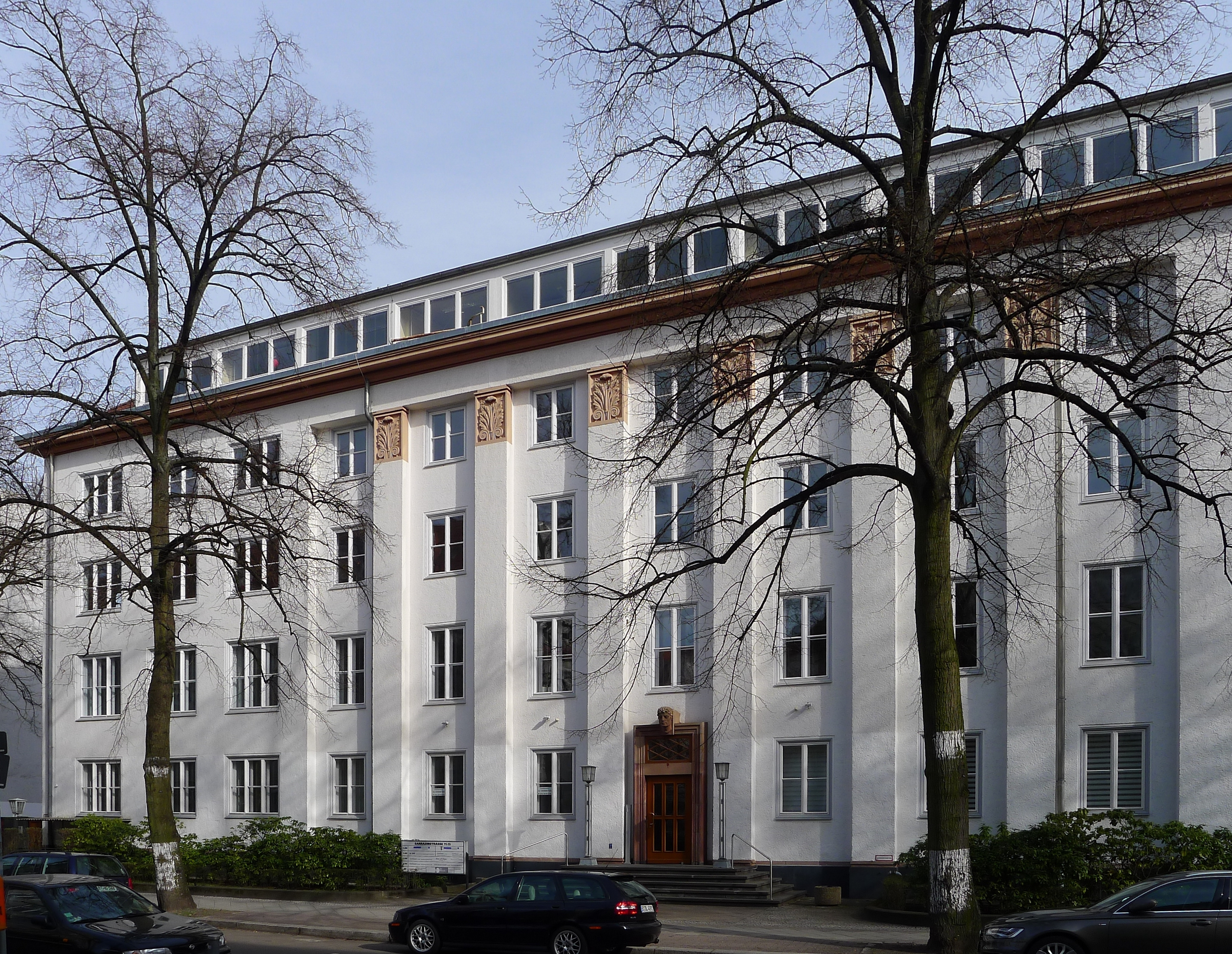 Verwaltungsgebäude